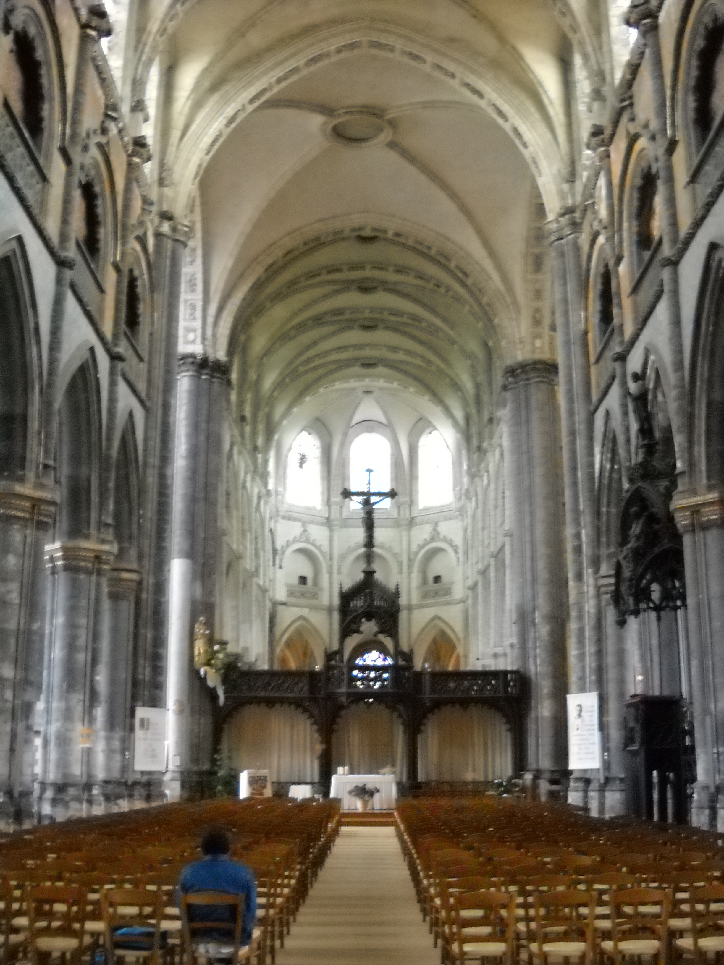 Nef centrale de la Collégiale-Saint-Pierre d'Aire-sur-la-Lys.